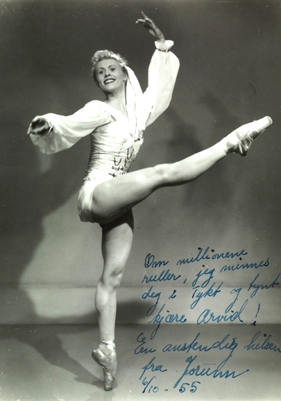 portrett, kvinne, ballettdanser, koreograf, dansende helfigur. Påskrift: "Om millionene ruller, jeg minnes deg i tykt og tynt kjære Arvid! En anstendig hilsen fra Jorunn. 6/10 -55.".